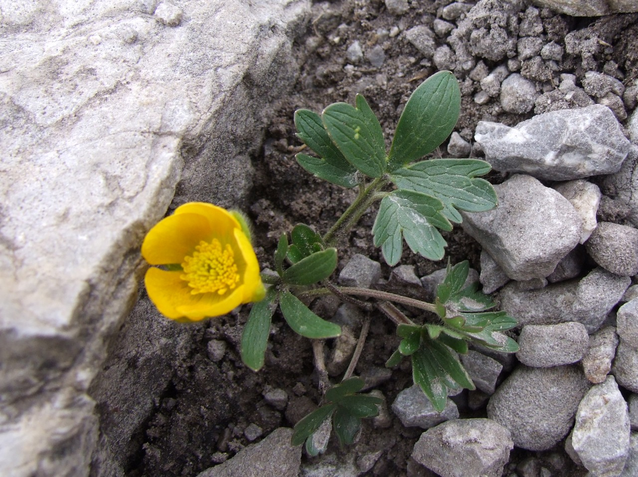 Ranunculus oreophilus